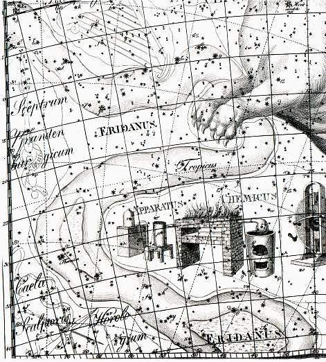 Eridanus